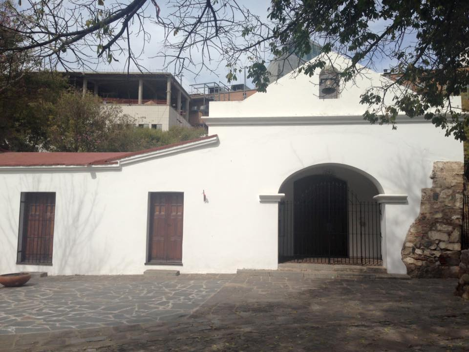 Foto frontal de la capilla